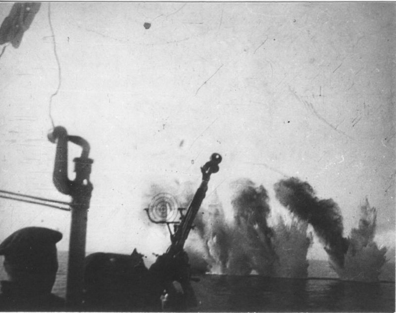 Расчет зенитного пулемета лидера «Ташкент» на фоне разрывов от вражеских авиабомб 27 июня 1942 года